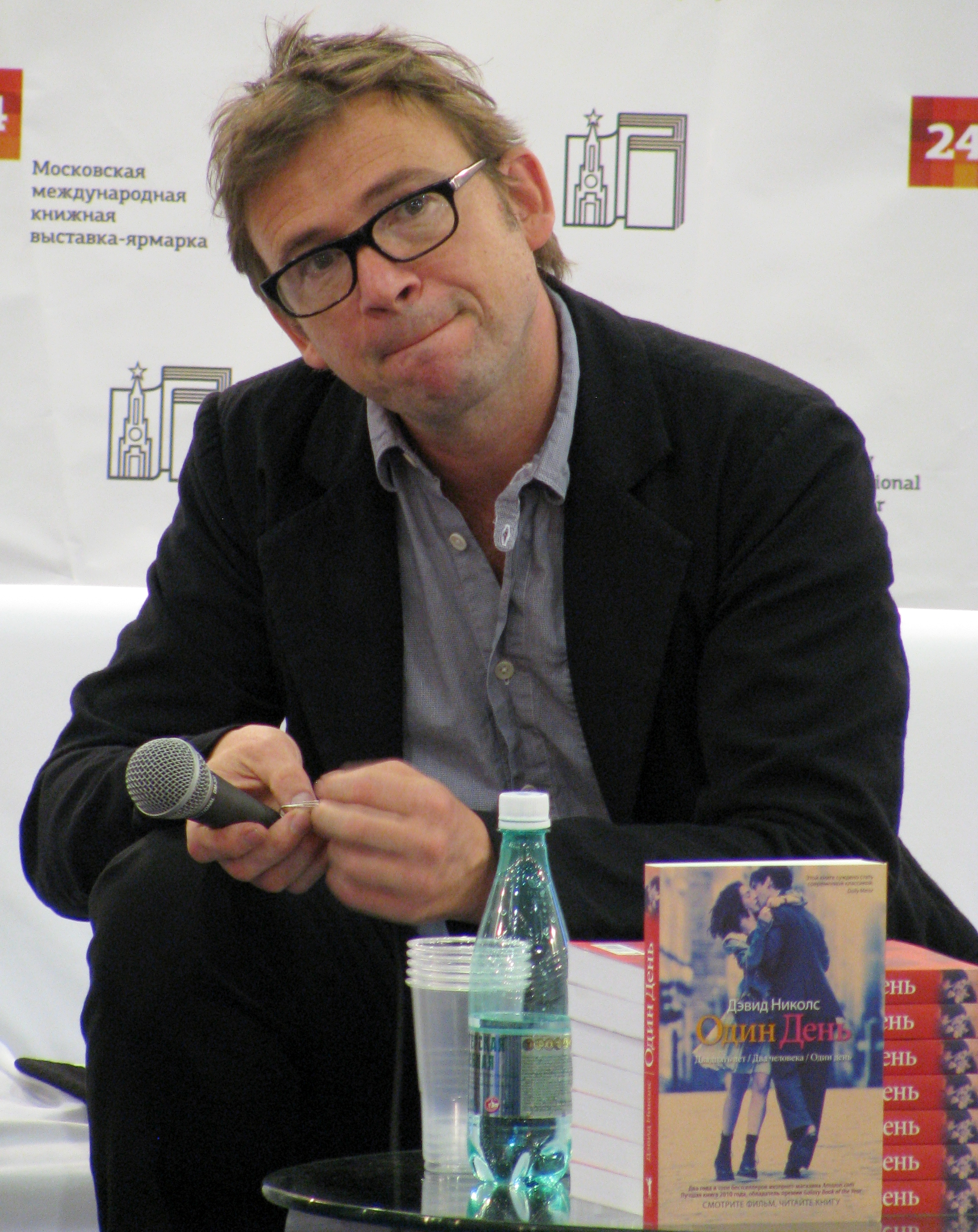 Дэвид Николс на ММКВЯ-2011